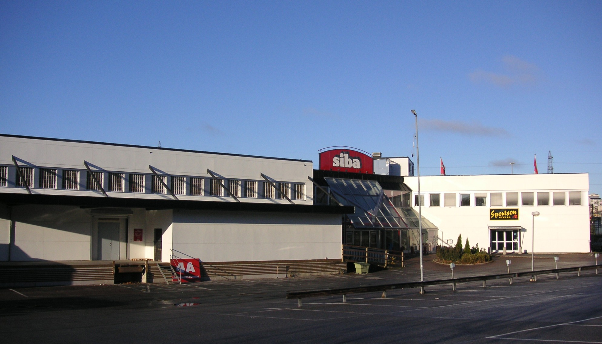 Exempel för ett industri-skärmtak på gamla Siba-huset, Kungens kurva